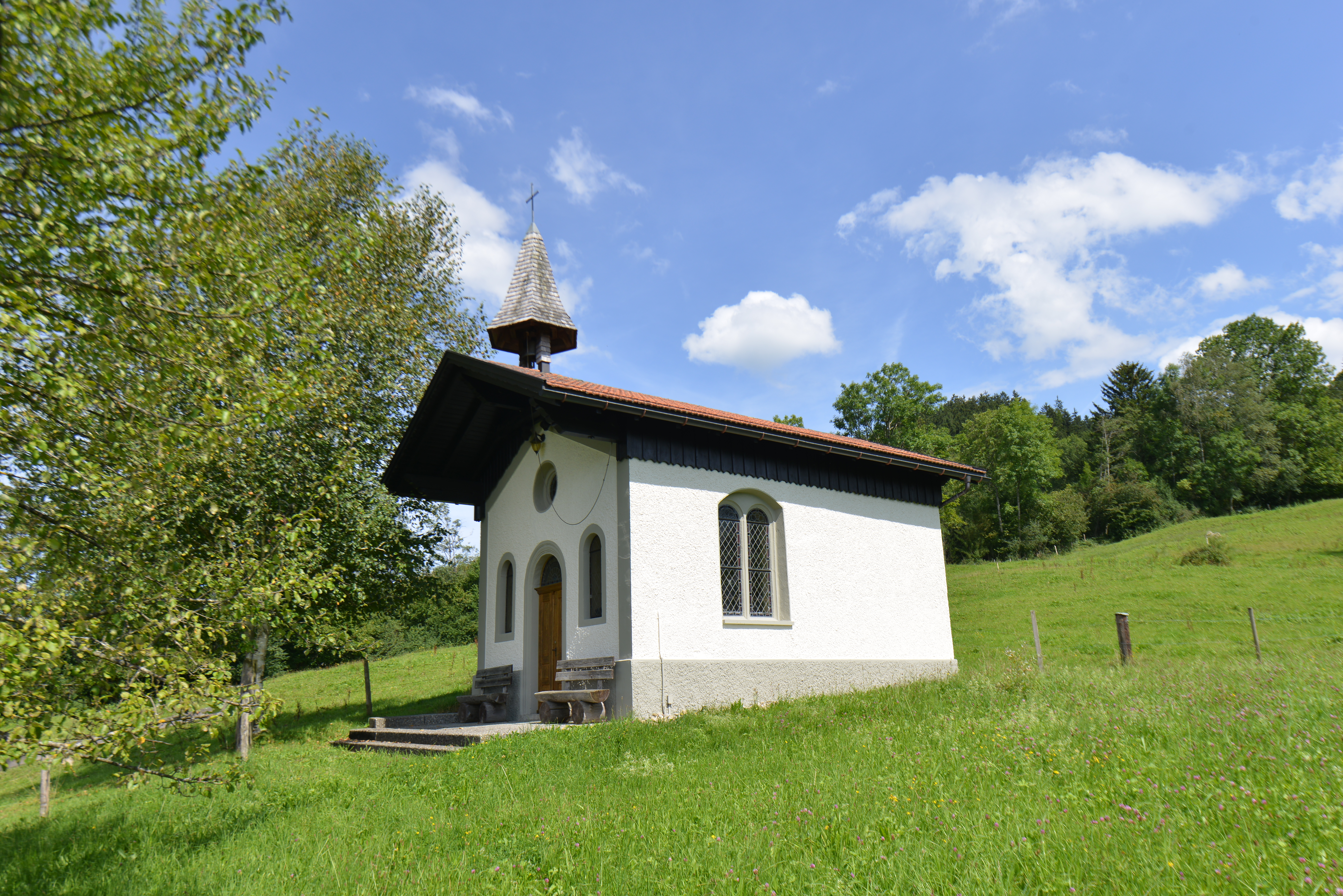 Lourdeskapelle bei Oberdreienau 5 in Sulzberg.